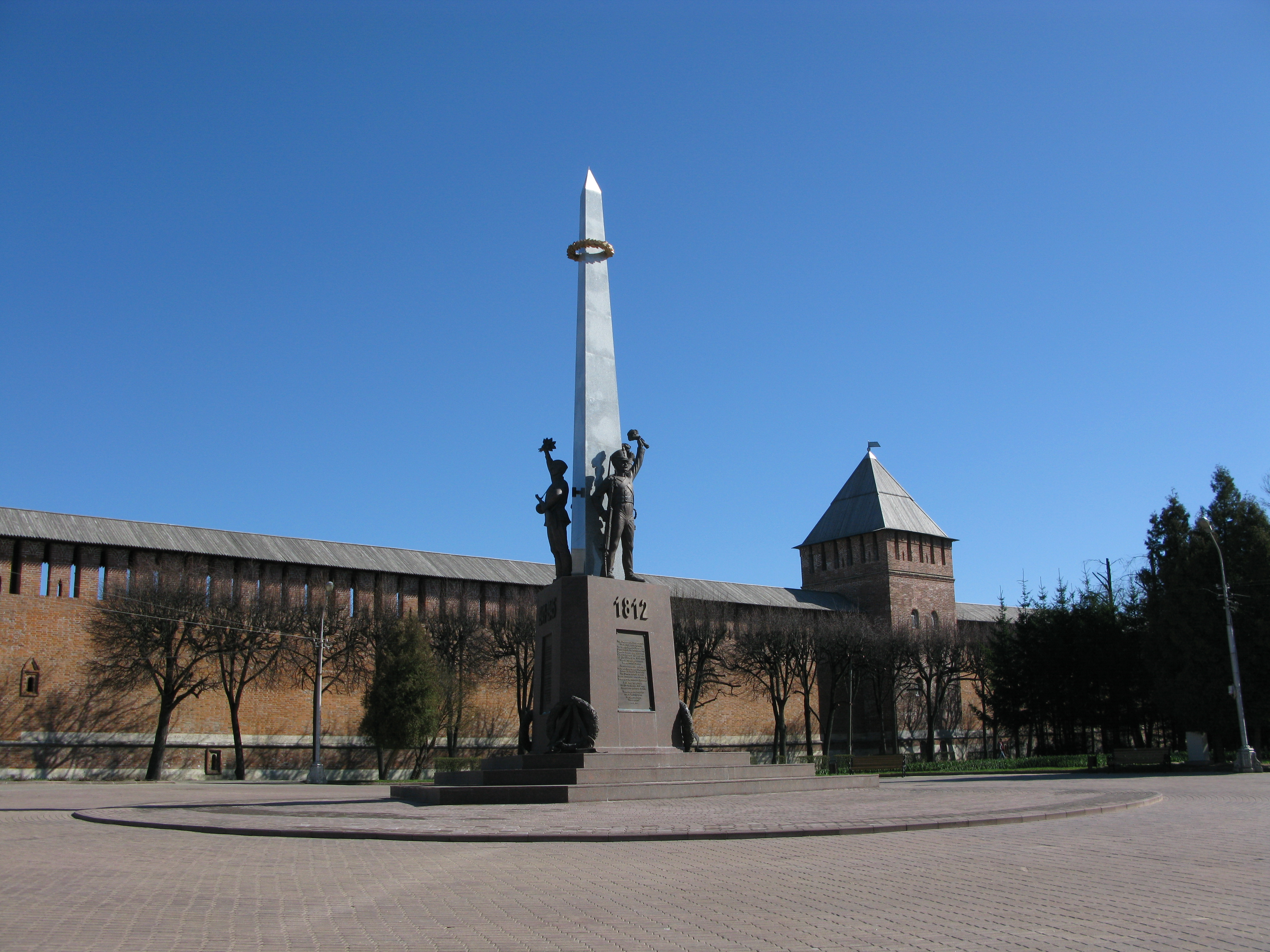 Молоховская площадь, где проходило крупное сражение русских войск с французами: площадь Смирнова, Смоленск, Смоленский район, Смоленская область